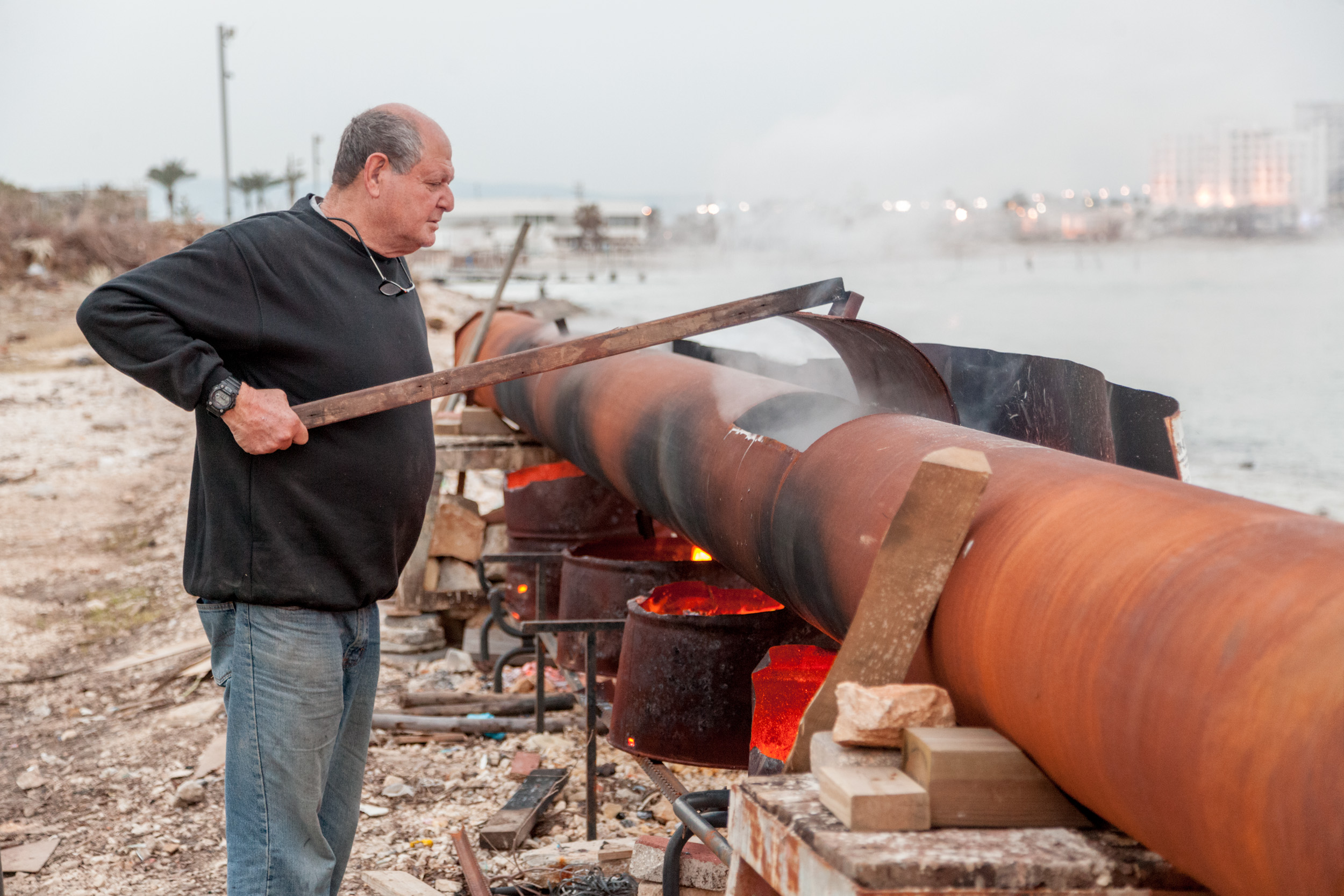 תנור פחמים אשר שימש לריכוך גזעי העץ על מנת שיהיו נוחים לכיפוף ועיצוב.